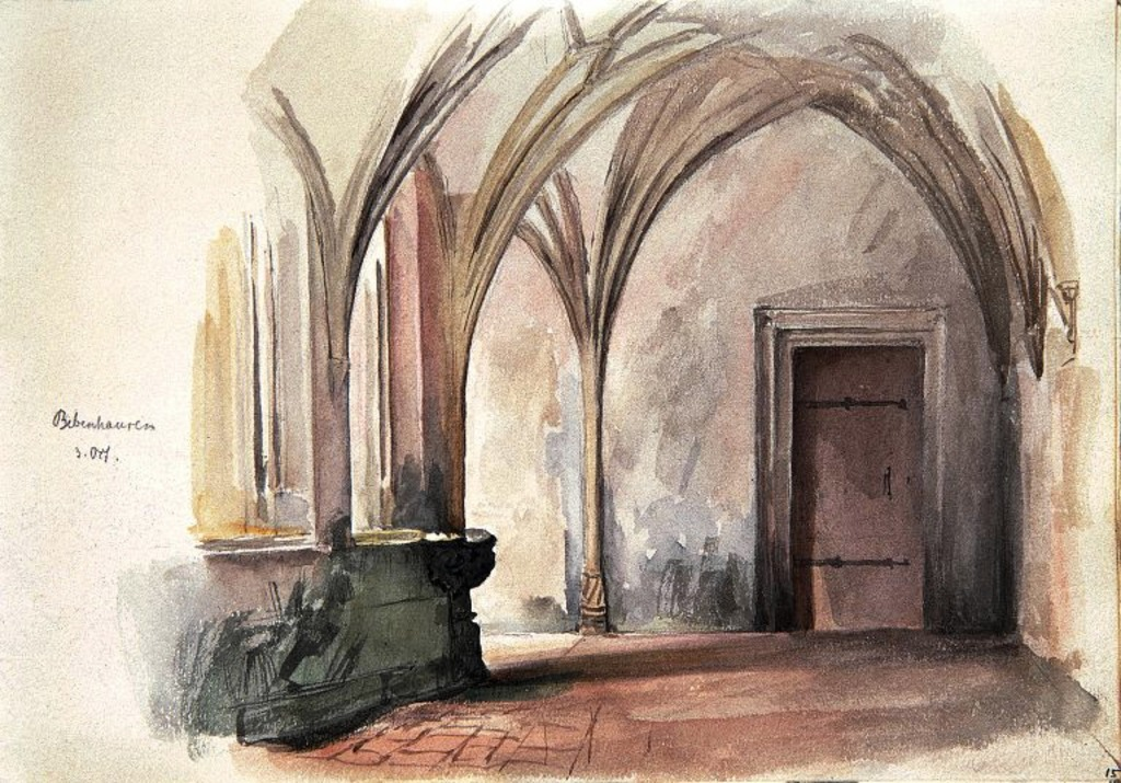 Kreuzgang im Kloster Bebenhausen, Detail mit gotischem Kreuzrippengewölbe (Aquarell aus dem Skizzenbuch, 3 Sammlung Kallee, Tübingen